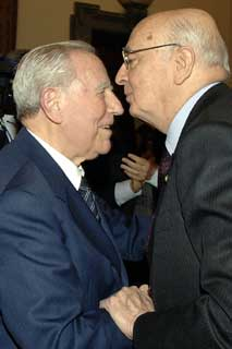 Giorgio Napolitano with former President Carlo Azeglio Ciampi